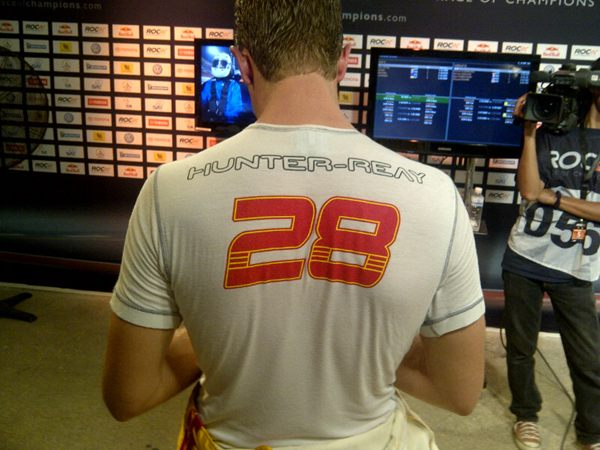 Ryan Hunter Reay